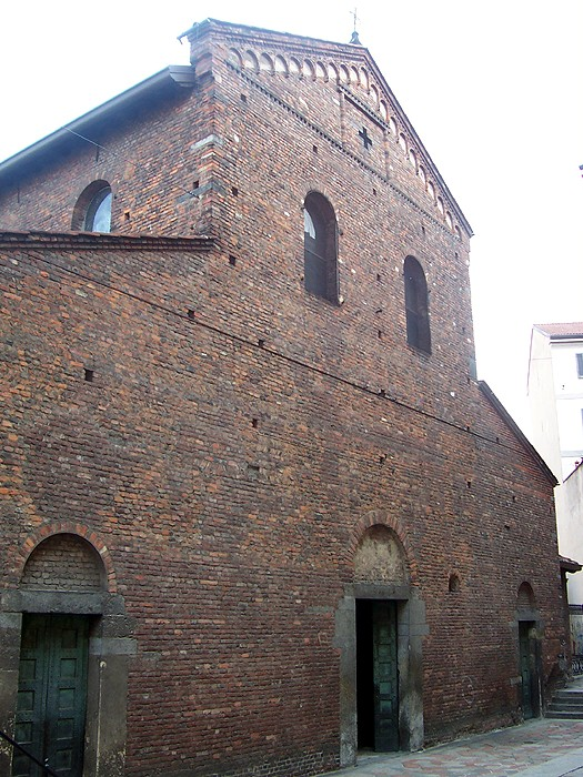 Chiesa di San Vincenzo in Prato a Milano.